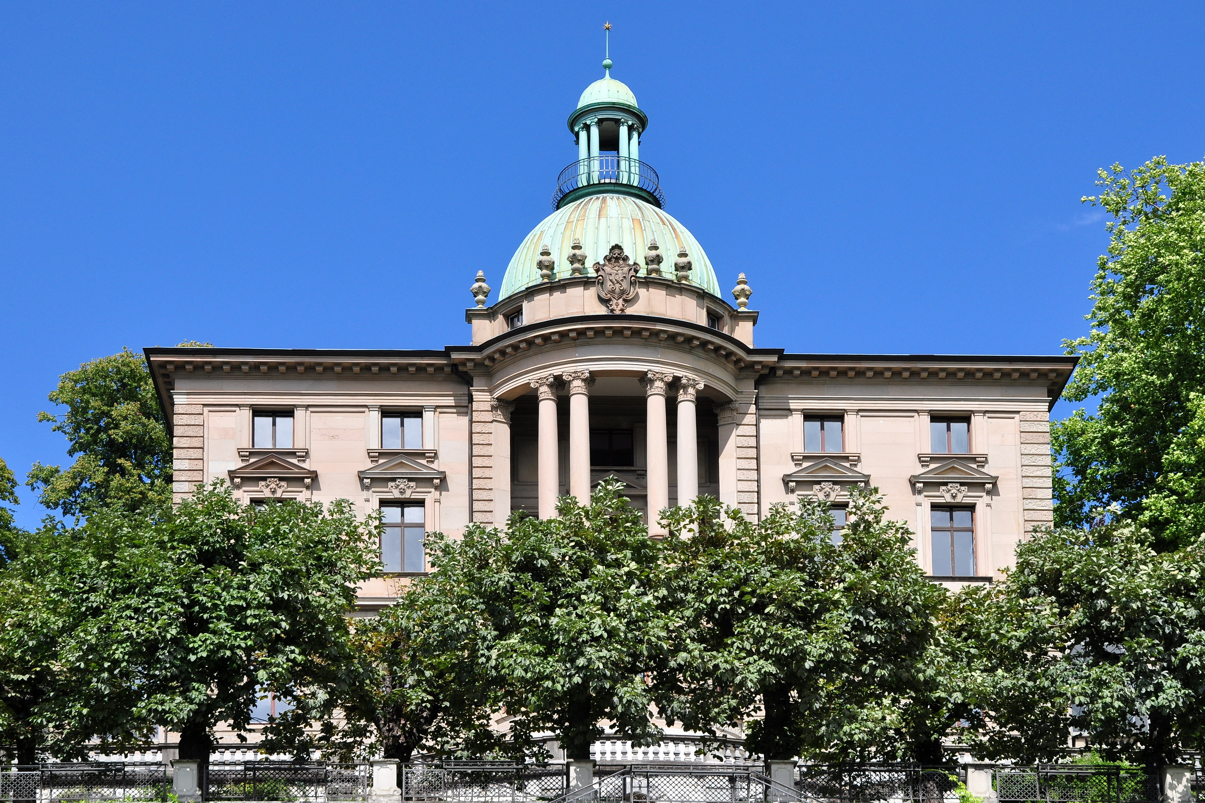 Villa Wegmann in Zürich-Mühlebach (Switzerland)